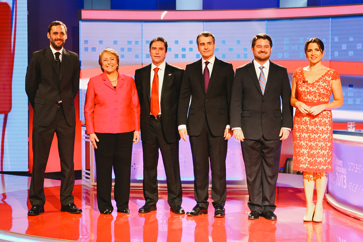 El periodista Daniel Matamala, los candidatos Michelle Bachelet, José Antonio Gómez, Andrés Velasco y Claudio Orrego, y la periodista Montserrat Álvarez, en la previa del Debate realizado por CNN Chile y Canal 13 para las primarias presidenciales de la Nueva Mayoría, 2013.